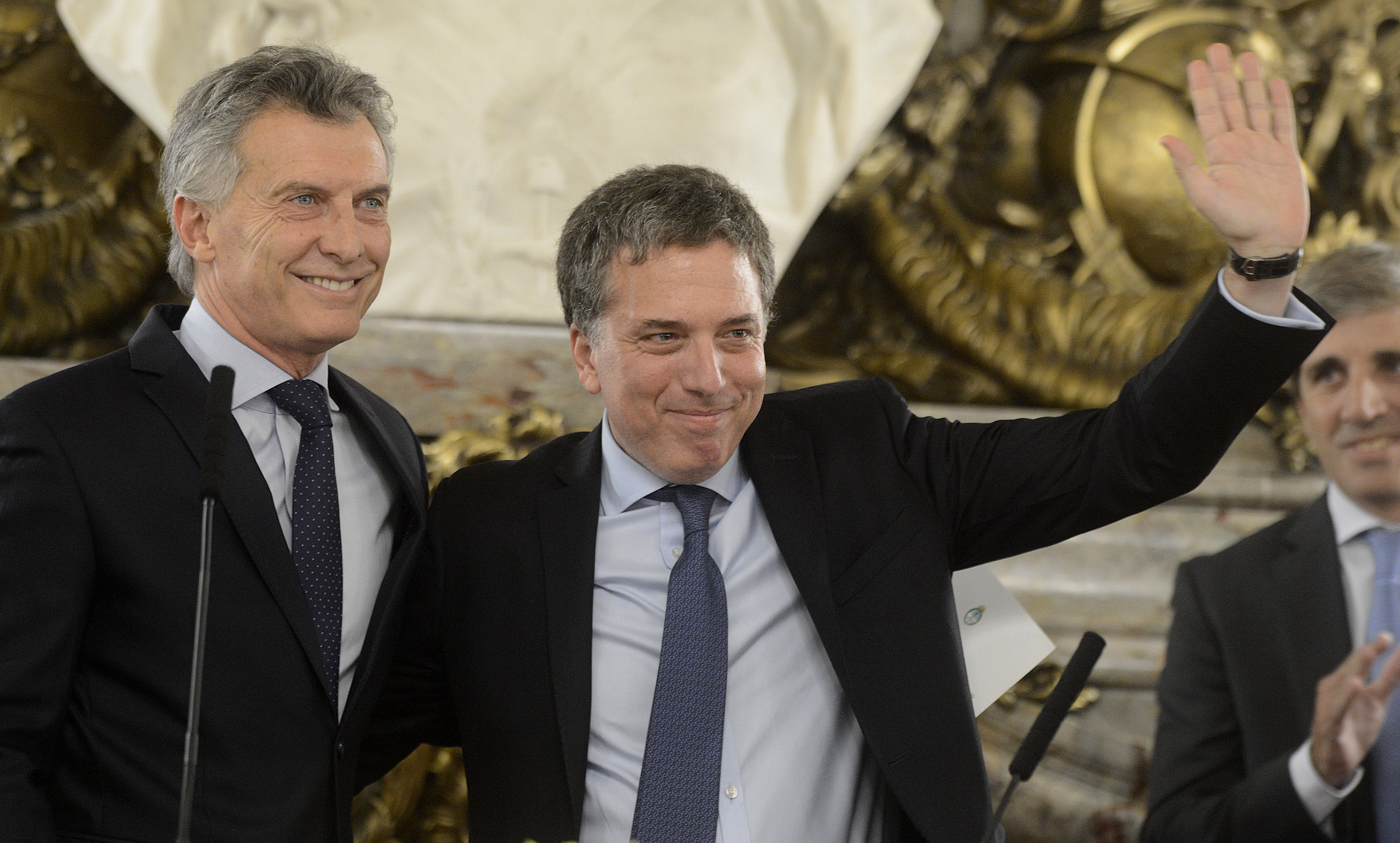 El presidente Mauricio Macri tomó juramento a los ministros de Hacienda, Nicolás Dujovne, y de Finanzas, Luis Caputo, en una ceremonia realizada en el Salón Blanco de la Casa de Gobierno.